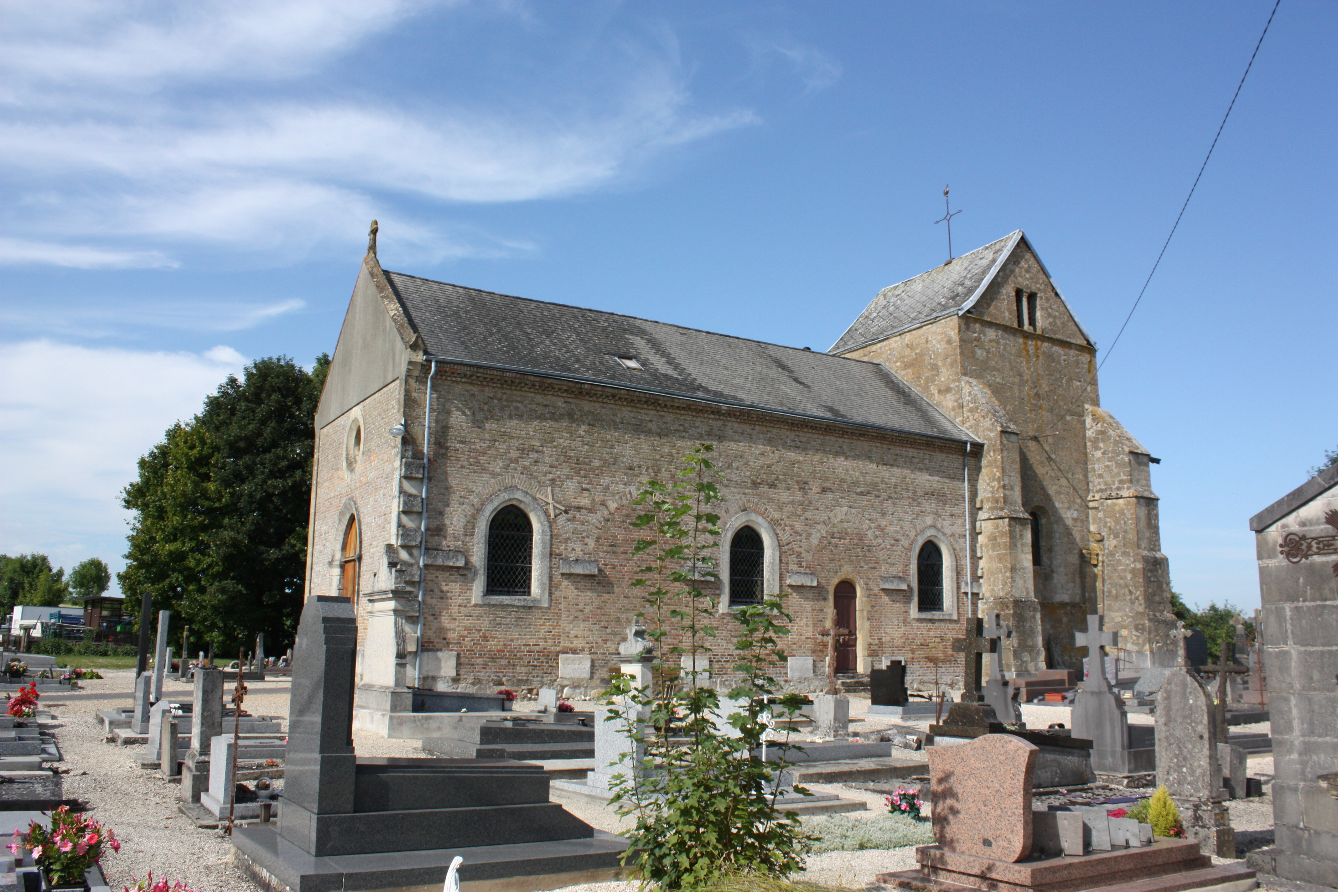 Villages Ardennais